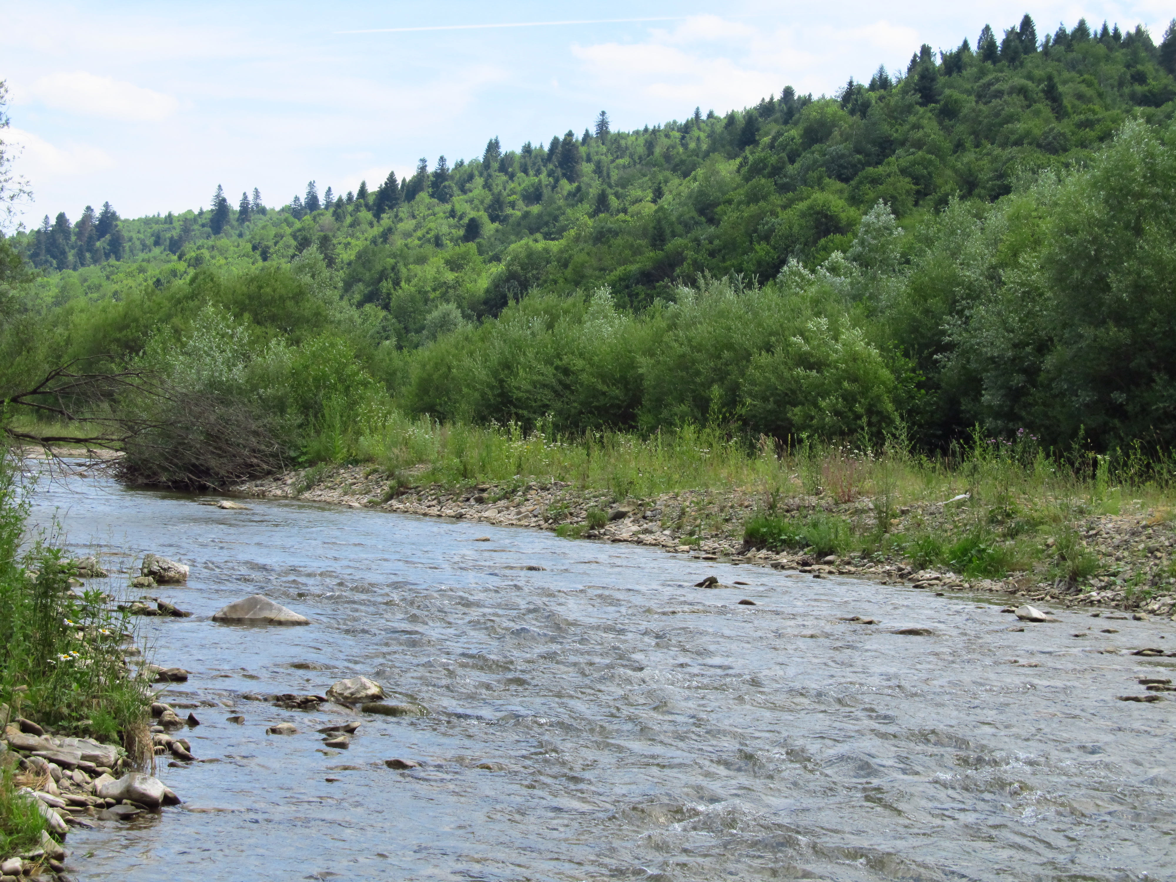 РІЧКА В СЕЛІ ТОПІЛЬНИЦЯ